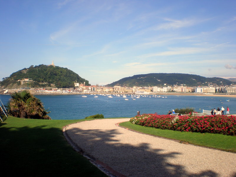 Jardines del Palacio de Miramar, en San Sebastián (España)